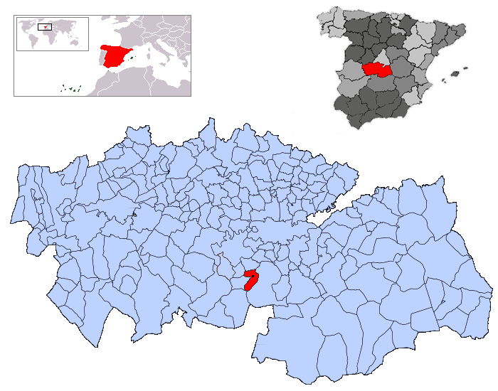 Pulgar en la provincia de Toledo